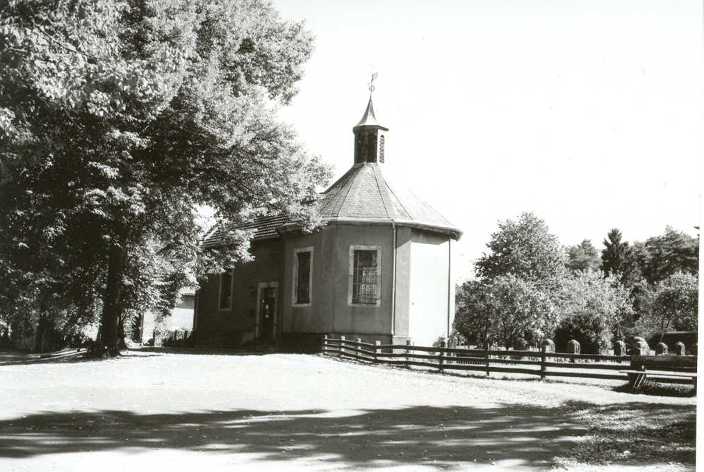 Die Johann Conrad Schlaun zugeschriebene Kapelle von Visbeck bei Dülmen